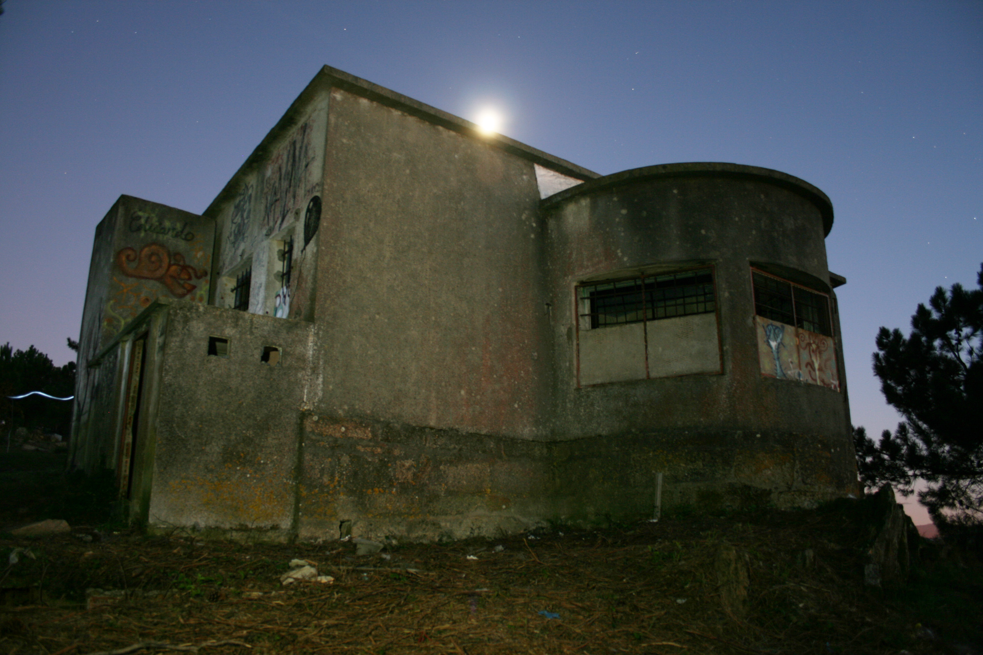 Edificio de la antigua batería de Monteferro, en Nigrán (Galicia, España). Situado en la cima de esta península, quizás era el puesto de mando de esa antigua unidad de artillería de costa. Battery of Monteferro Building of the old battery of Monteferro, in Nigrán (Galicia, Spain). Located at the top of the peninsula, perhaps it was the command post of the old coastal artillery unit.